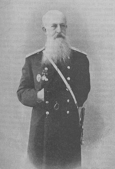 Description=Russian General Alexandr von Bilderling